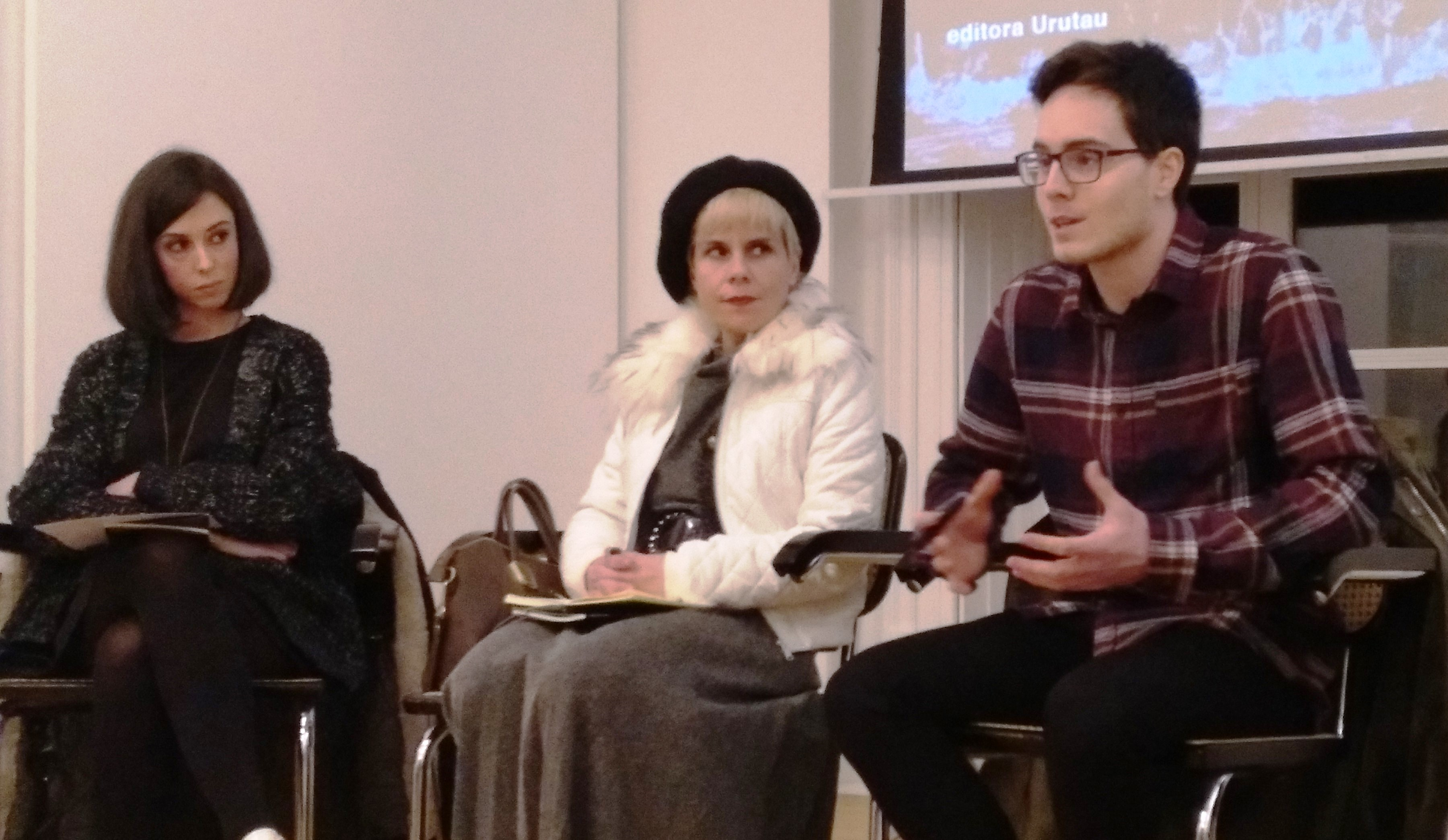 Espazo Nemonon, Pontevedra, 03/02/2019. Presentación de "Metafísica da ausencia" de Marcus Daniel Cabada, con Tamara Andrés e Silvia Penas